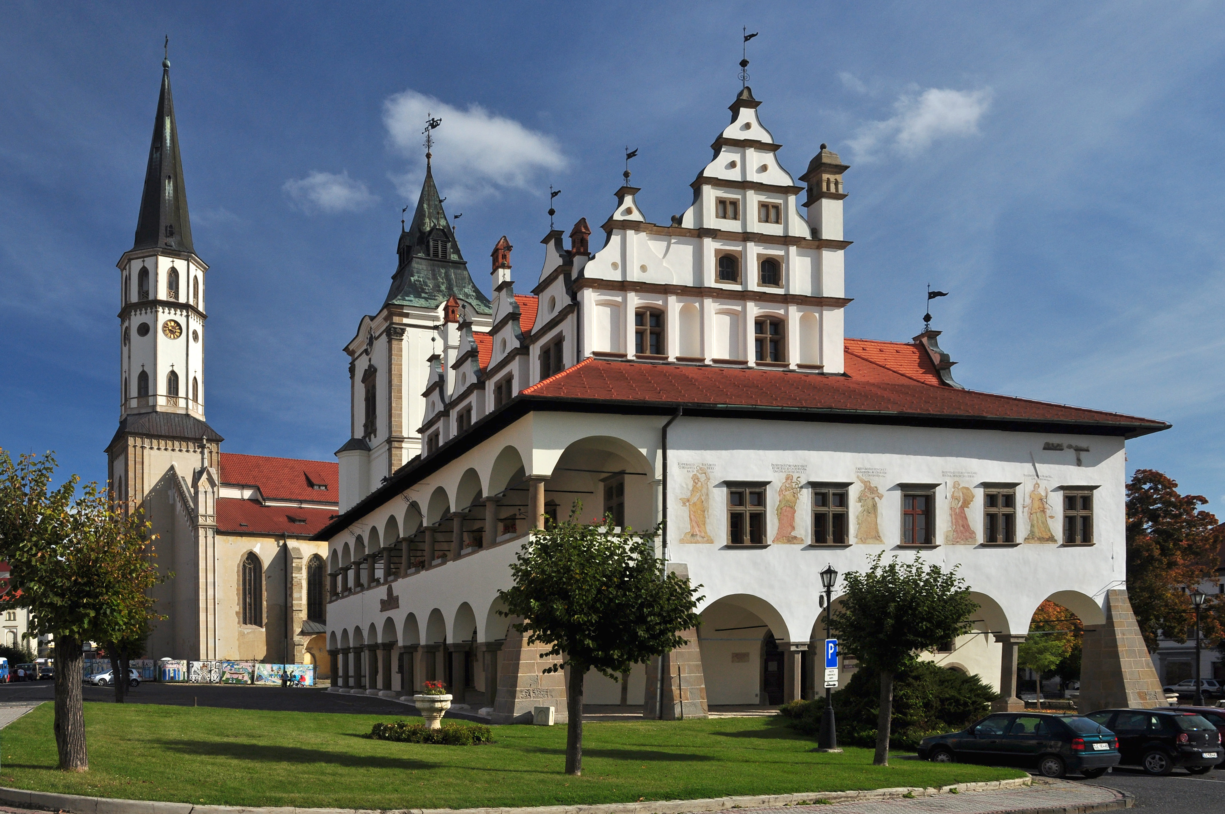 Renesančná budova bývalej radnice v Levoči. Nachádza sa v historickom centra Levoče, ktoré je zapísané do Zoznamu svetového dedičstva UNESCO. V súčasnosti je časťou Slovenského národného múzea - Spišského múzea v Levoči. V pozadí Bazilika sv. Jakuba, kde sa nachádza svetoznámy gotický oltár Majstra Pavla z Levoče.